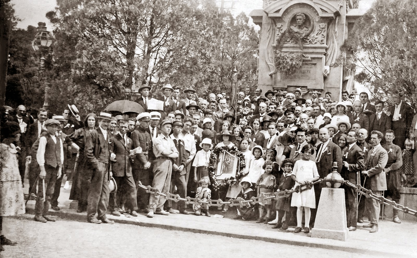 Честване на Стефан Караджа пред паметника на Васил Левски в София, 1924г